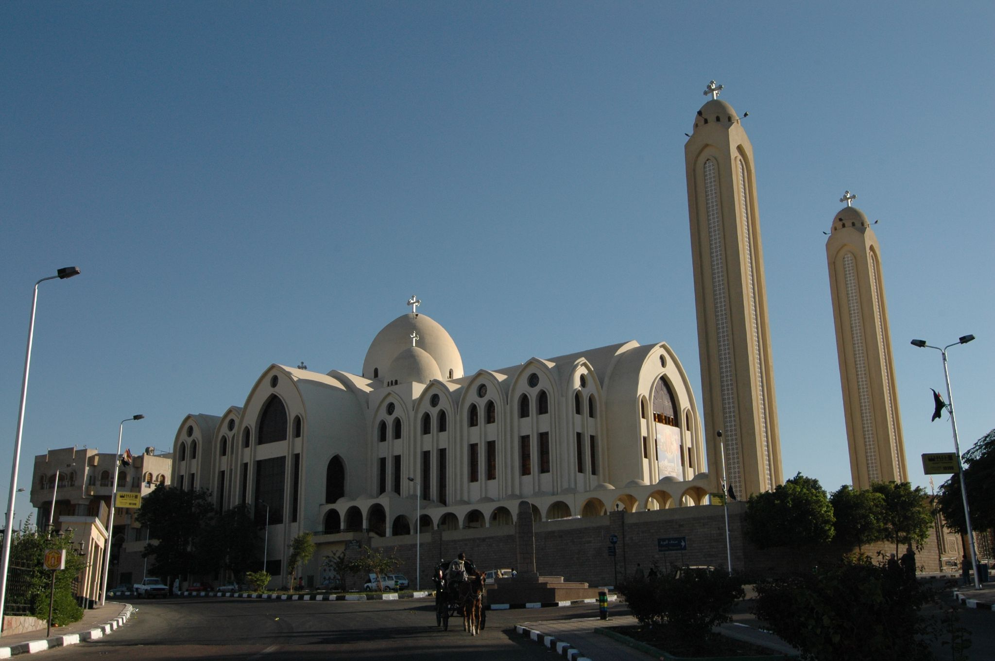 Aswan: chiesa ortodossa